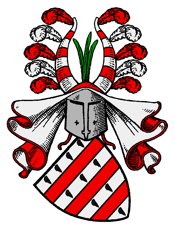 Wappen der Queis (Queiss; Queist; Variante)